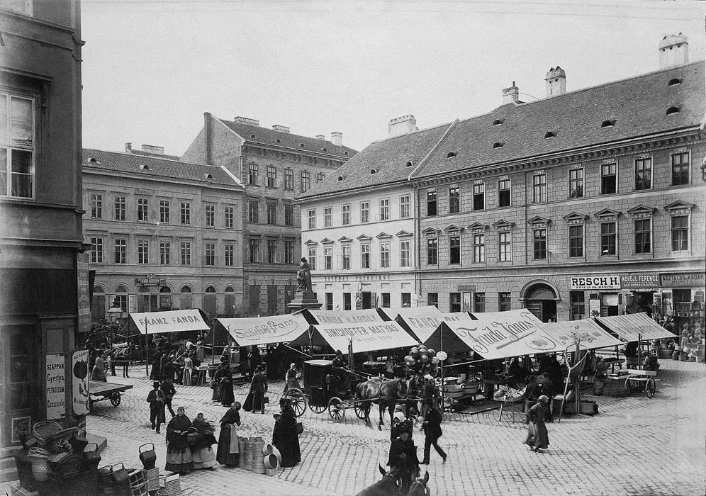 Hal tér (körülbelül a mai Budapest V. kerületi Molnár és Irányi utca találkozási pontja), 1894 körül. 1879-ig itt volt az 5. szám alatt a Zeneakadémia. Az Erzsébet híd építésekor a tér megszűnt. A fotó eredetije Budapest Főváros Levéltárában található.